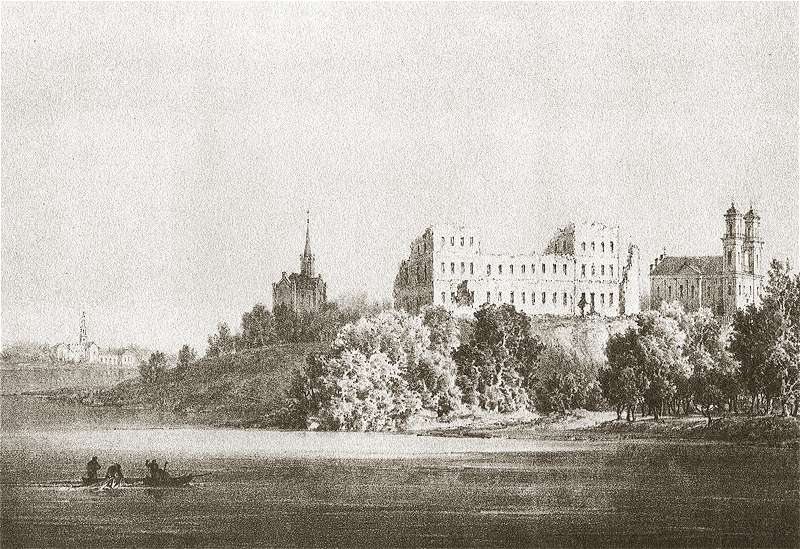 Drawing. Biržai in Lithuania